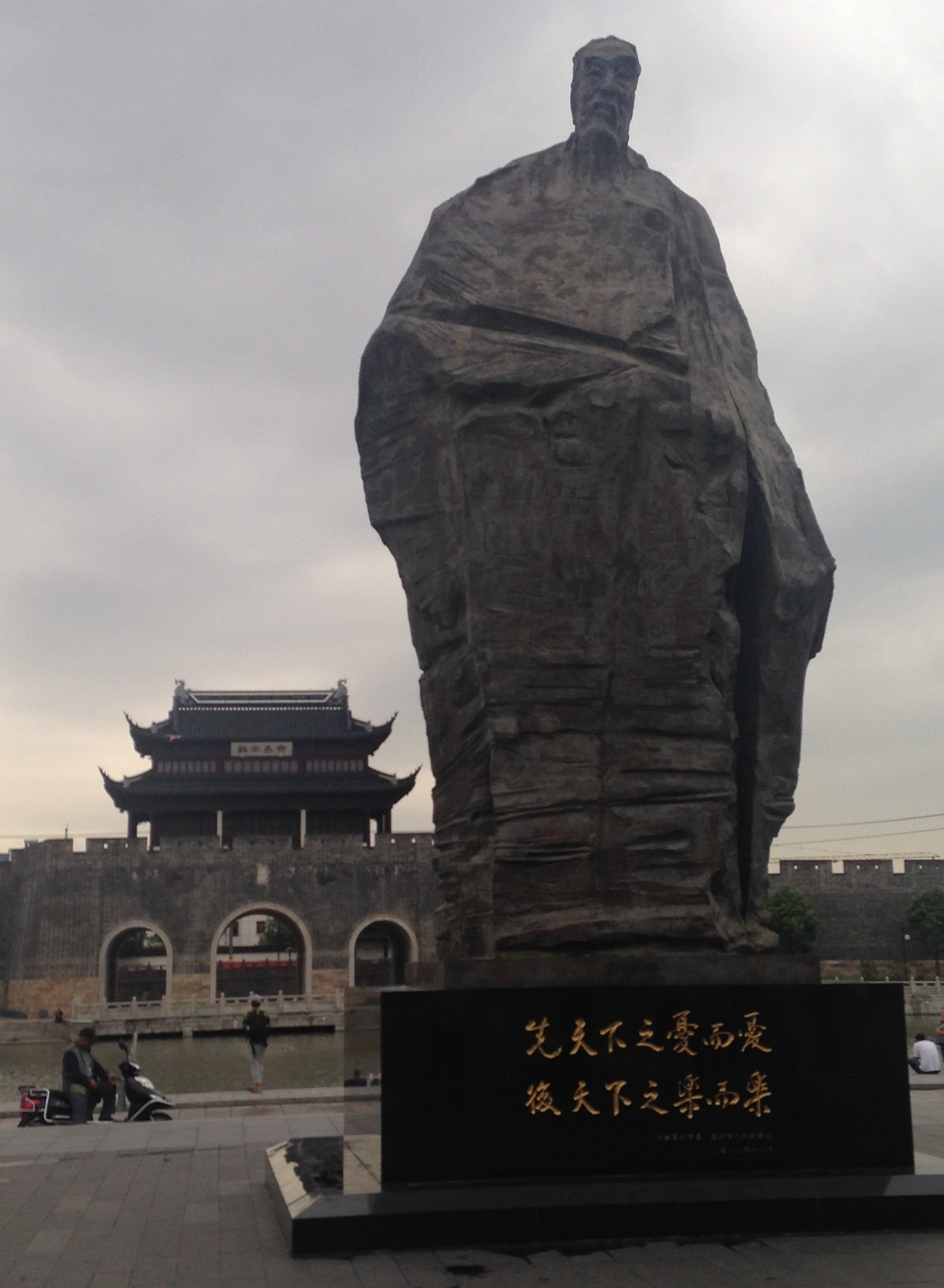 蘇州駅前の范仲淹像